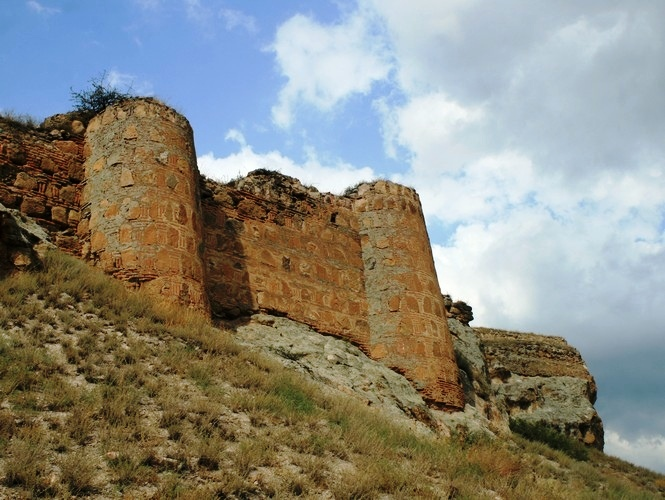 Останки крепости Чапала - Гочулу в селе Чапала (Гочулу) Болнисского района Грузии